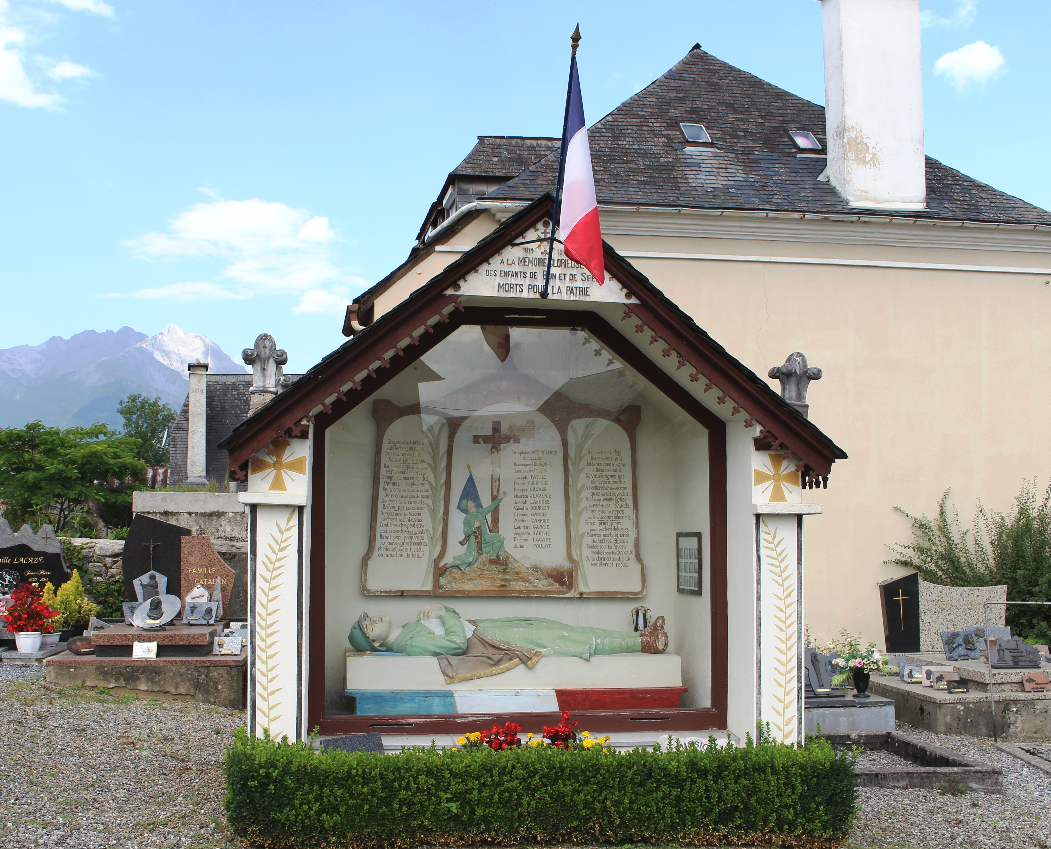 Monument aux morts de Bun (Hautes-Pyrénées)